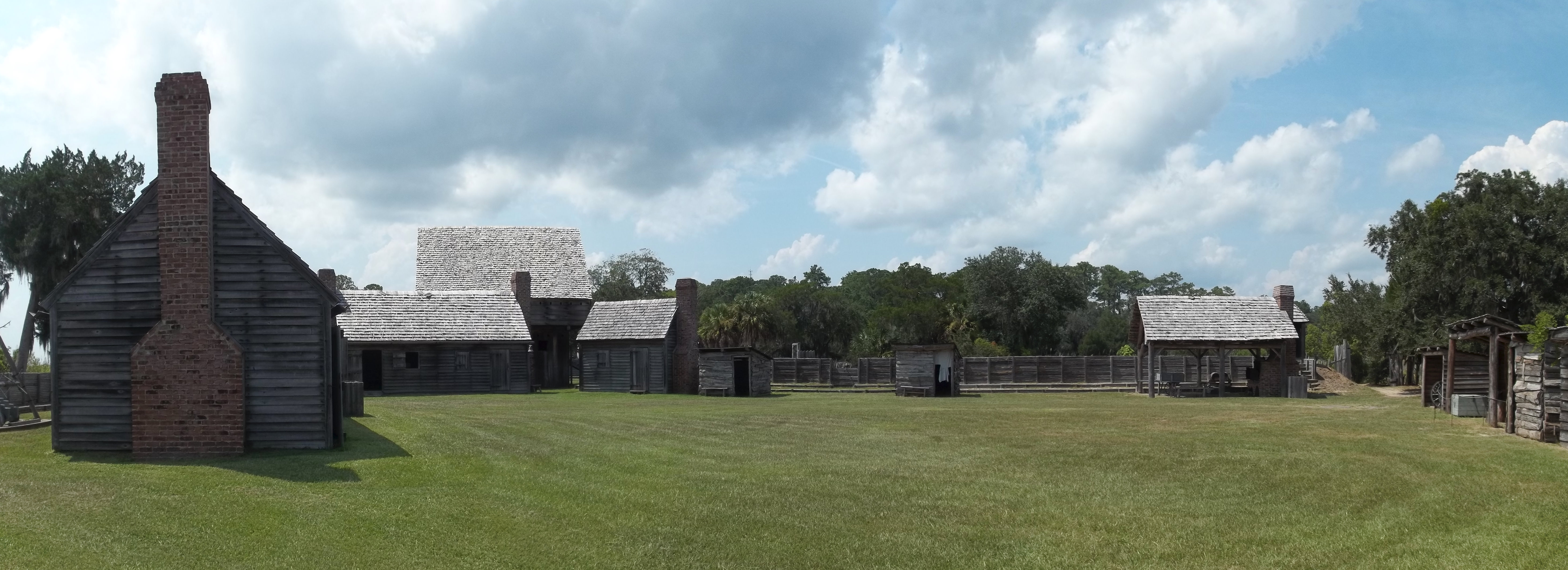 Darien, Georgia: Fort King George